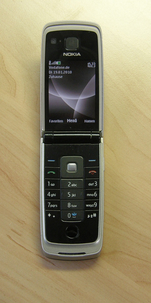 Nokia 6600 Fold